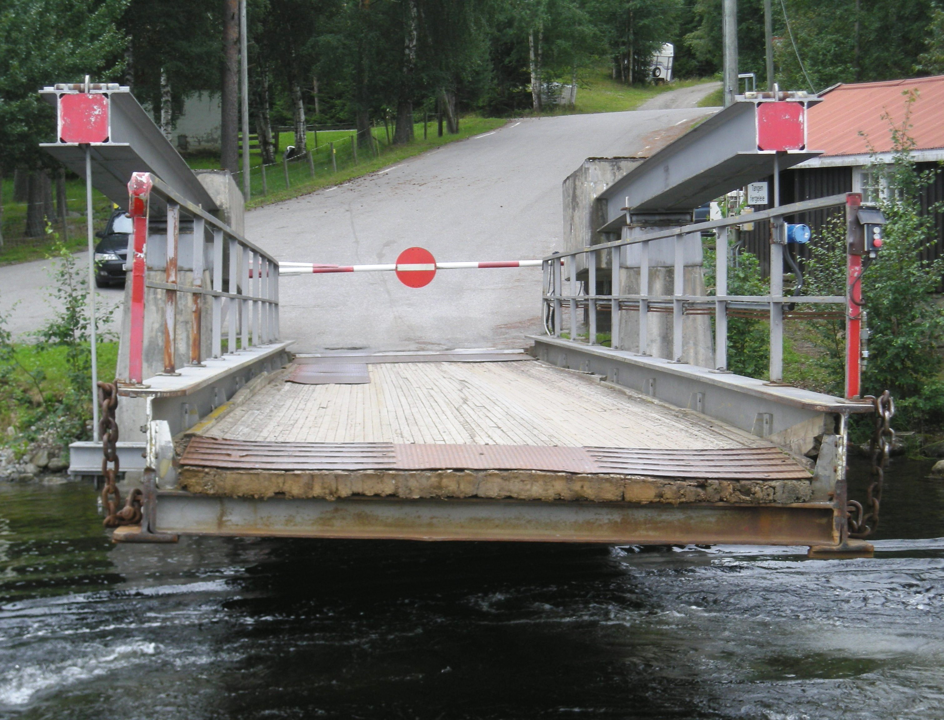 Tangen fergekai nær Bjoneroa i Gran på Hadeland. Randsfjordferga inngår i fylkesvei 2336 (tidl. 59), som ellers strekker seg over 180 meter på vestsiden av fjorden, opp til fylkesvei 245.